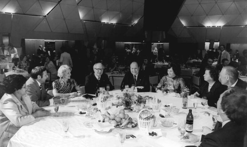 ADN-ZB Koard-23.4.76 Berlin: Eröffnung des Palastes der Republik Während des Balls im Großen Saal des Palastes hatten zusammen mit dem Ersten Sekretär des ZK der SED, Erich Honecker (4.v.l.), der Minister für Bauwesen der DDR, Wolfgang Junker (5.v.l.), der Direktor der Aufbauleitung des Palastes, Prof. Dr. Ehrhardt Gißko (2.v.r.), der Architekt Heinz Graffunder (r.) und der Stukkateur Rudi Künzel und deren Ehefrauen eine Tischrunde gebildet.